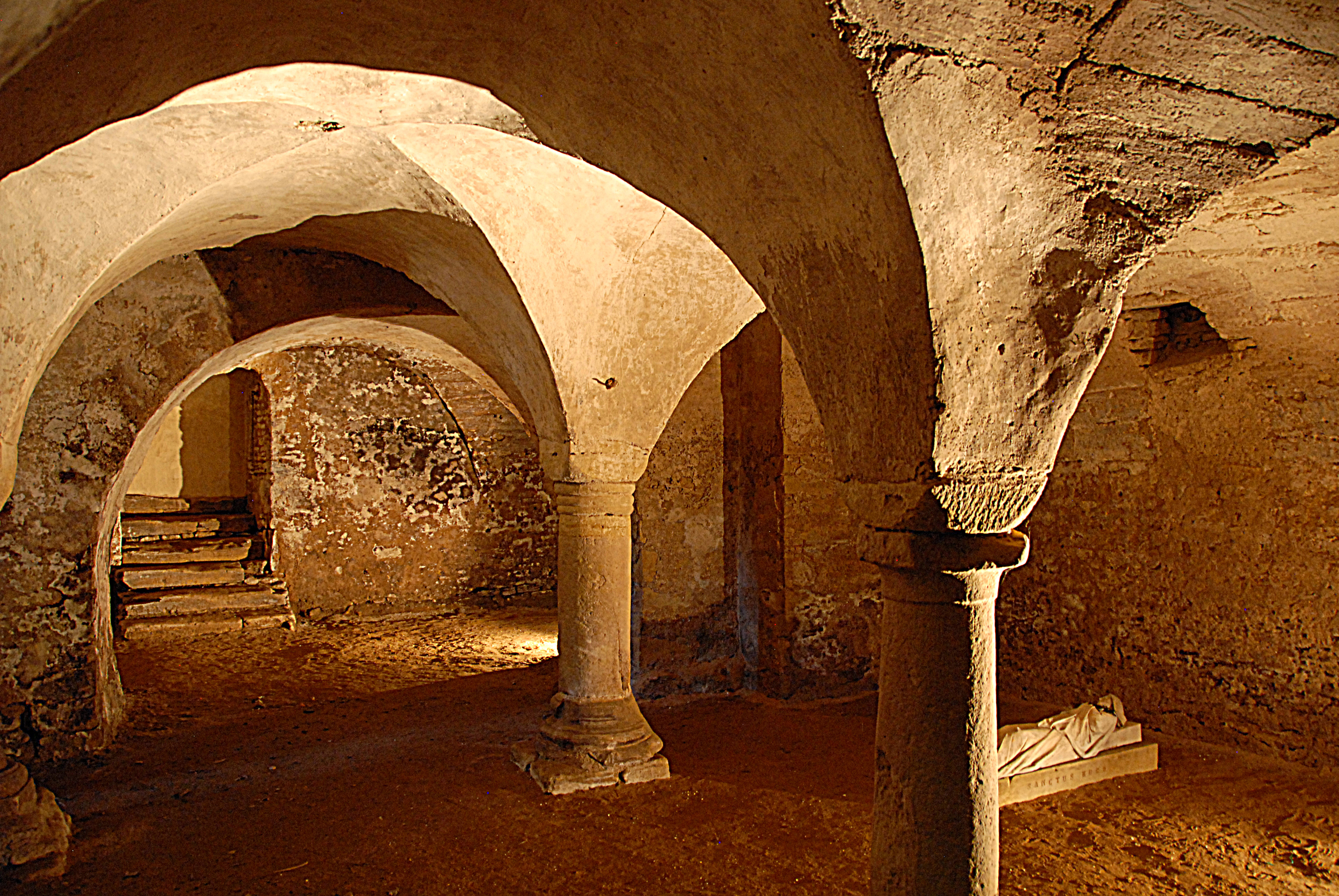 Krypta